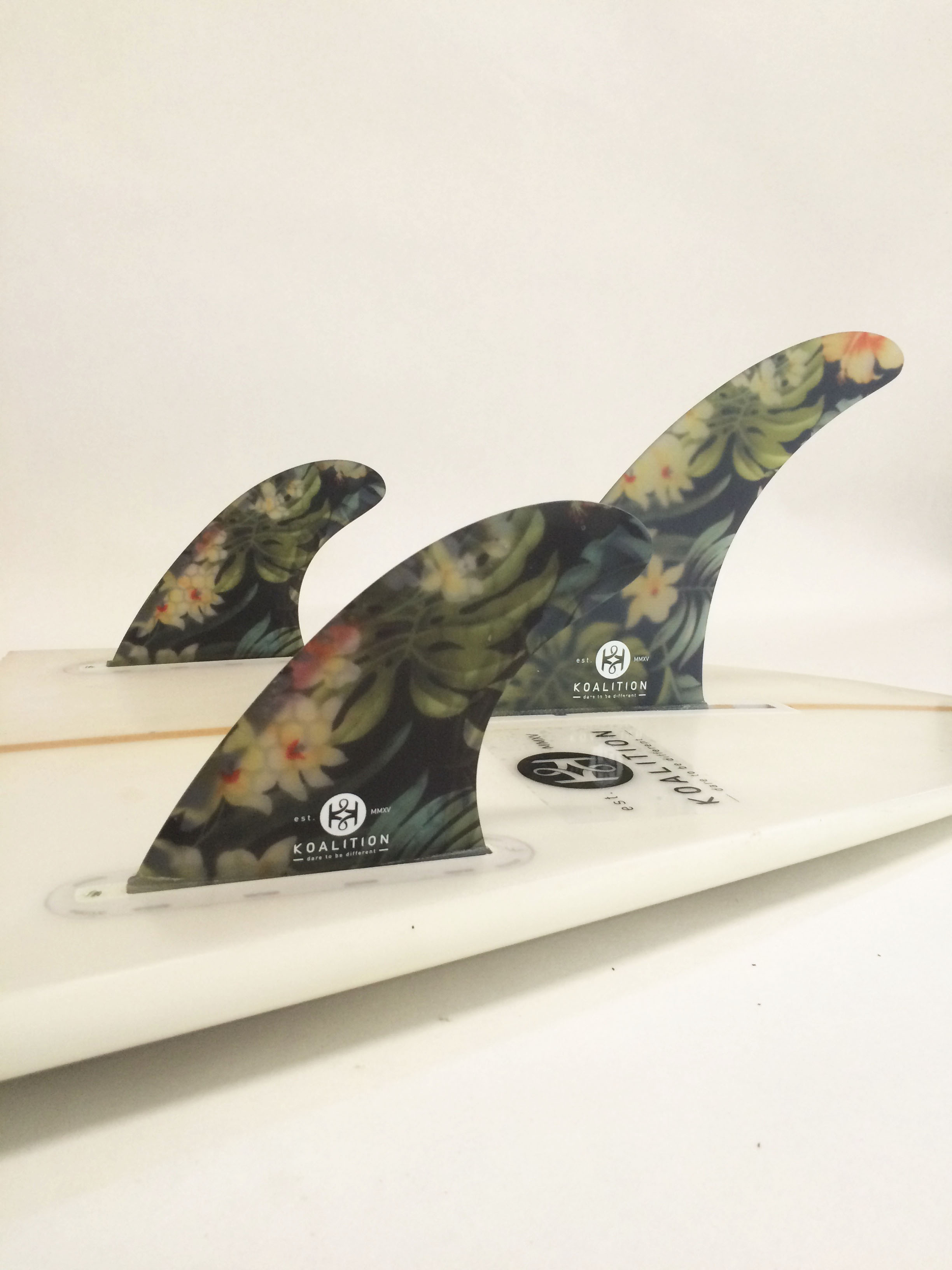 Une dérive à embase US peut être montée avec de chaque coté des dérives latérales